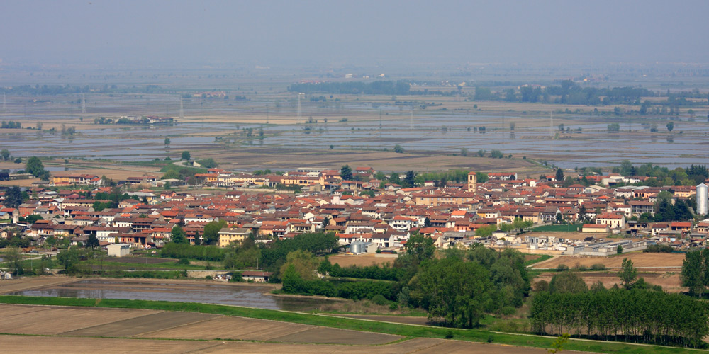 Panorama di Palazzolo Vercellese (VC) dalle colline del Monferrato casalese.